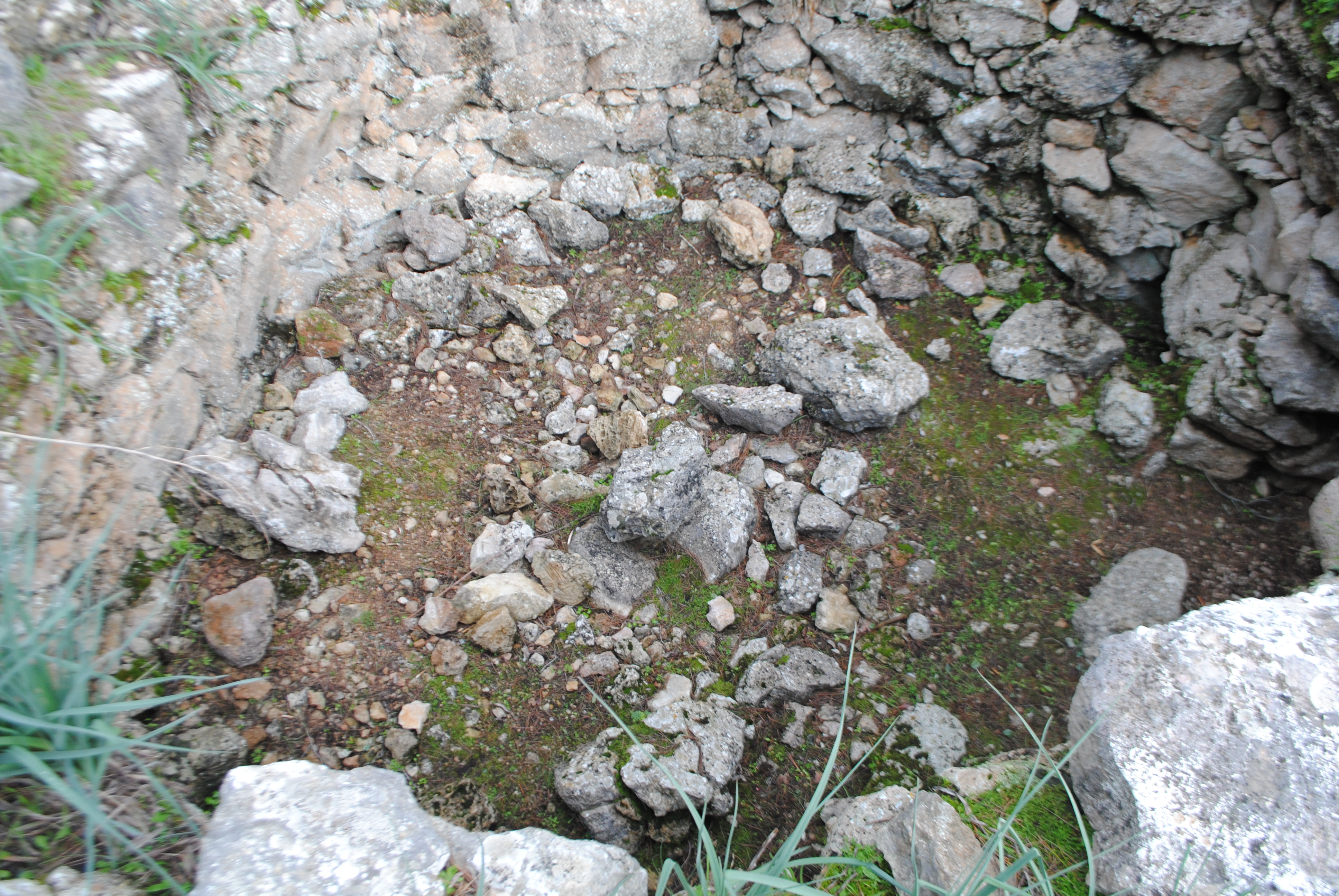 Interior del talaiot de Coma-Sema